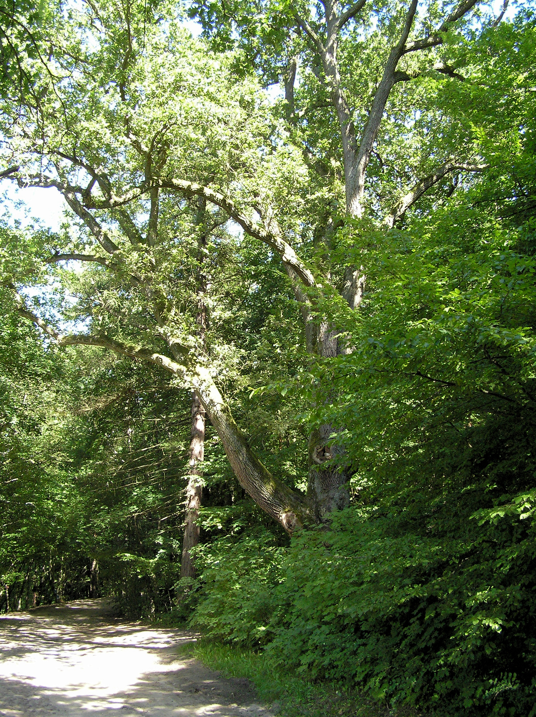 Świt - pomnikowy dąb "Wisielec"